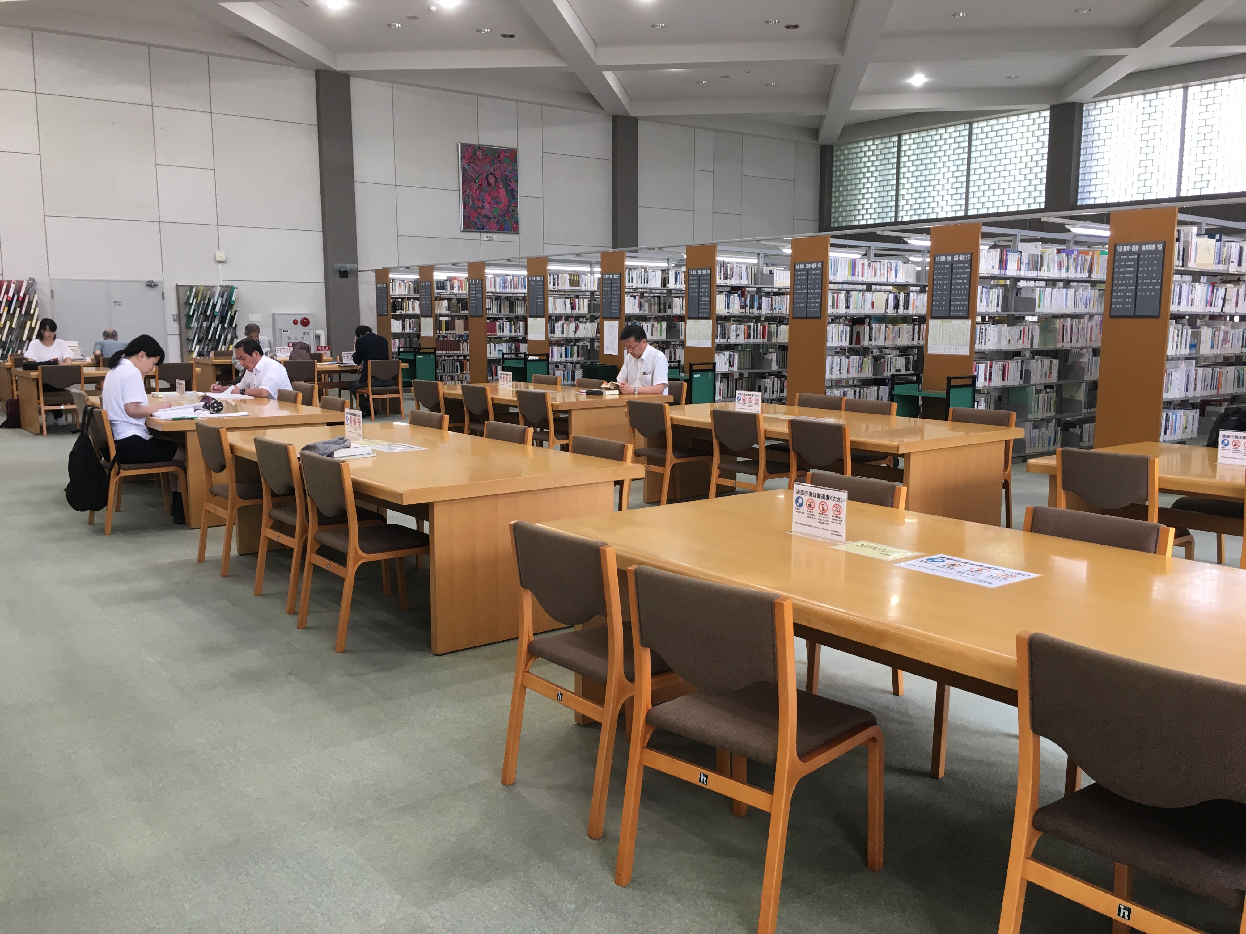 富山県立図書館閲覧室